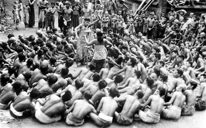 Repronegatif. Penari kecak dalam suatu pertunjukan